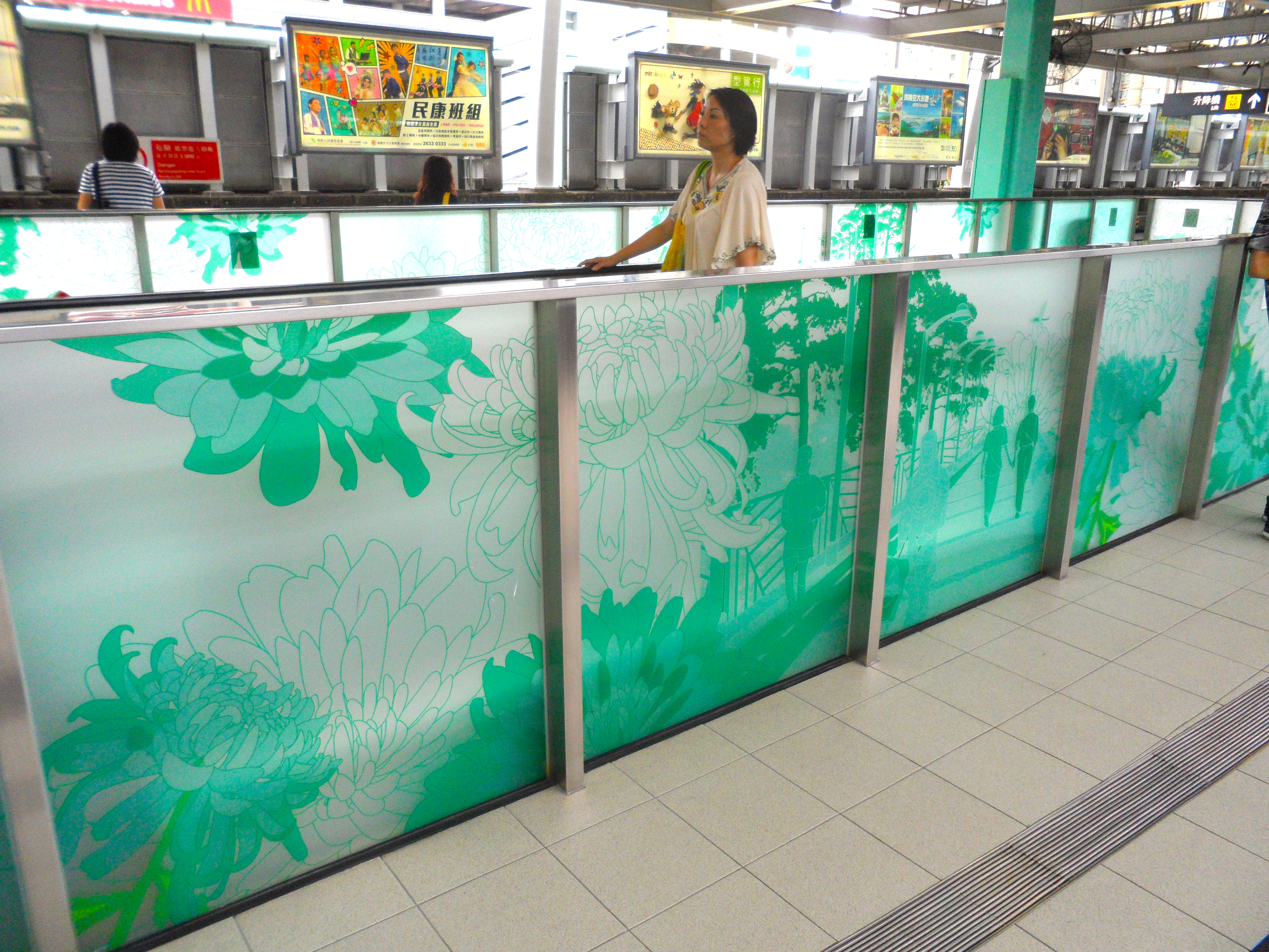 港鐵大水坑站月台佈置